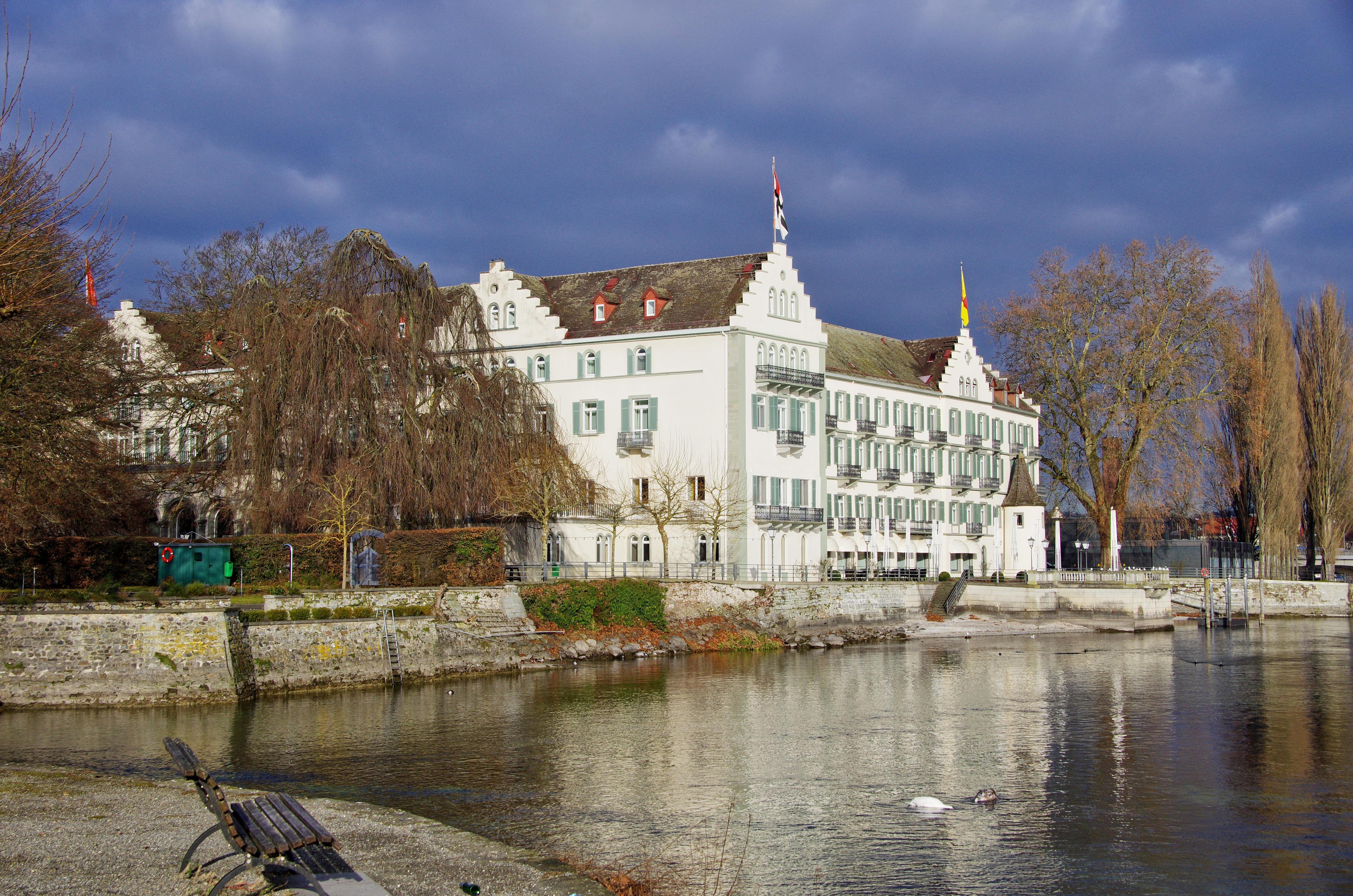 Das Inselhotel